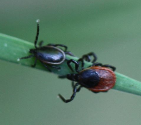 Gemeiner Holzbock (Ixodes ricinus) am 30. Mai 2018 in der Schwetzinger Hardt, links das Männchen, rechts das Weibchen